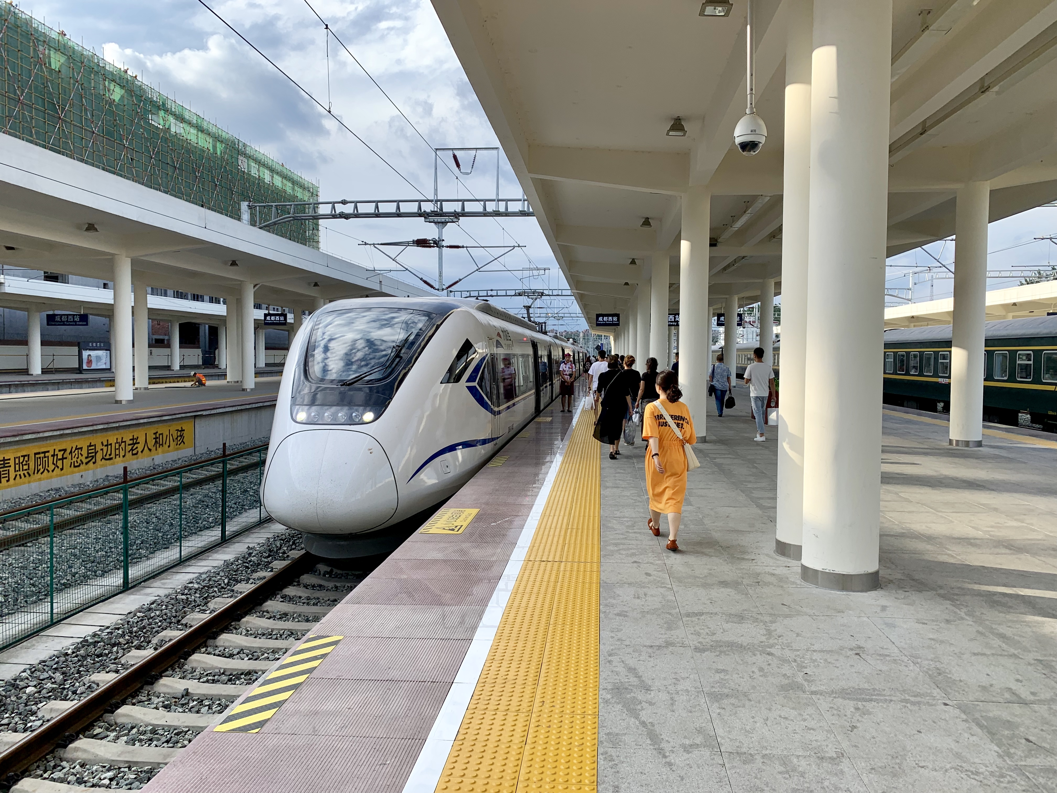 停靠在成都西站站台的“天府号”四节编组市域动车组列车